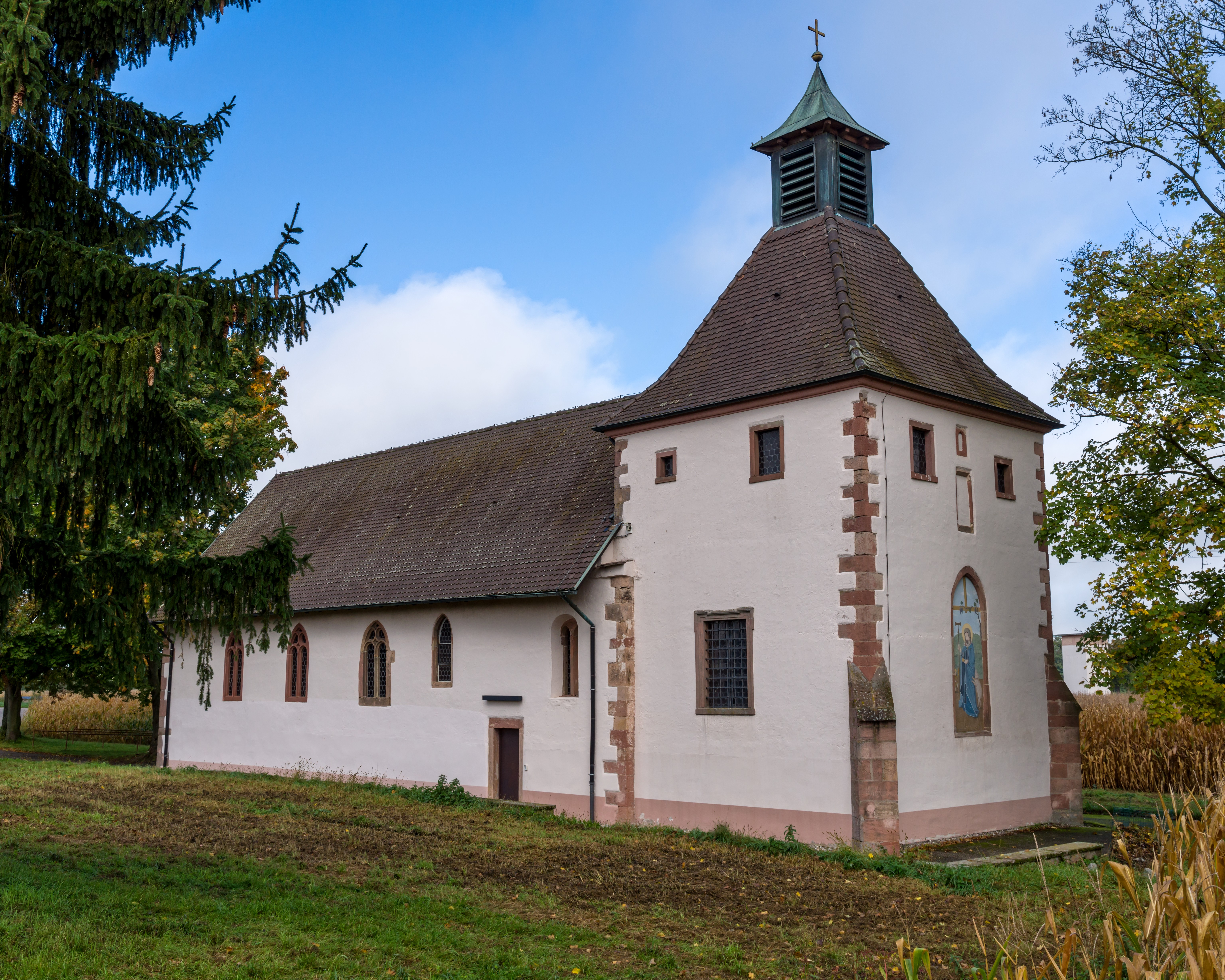 St. Bartholomäus. Ortenberg